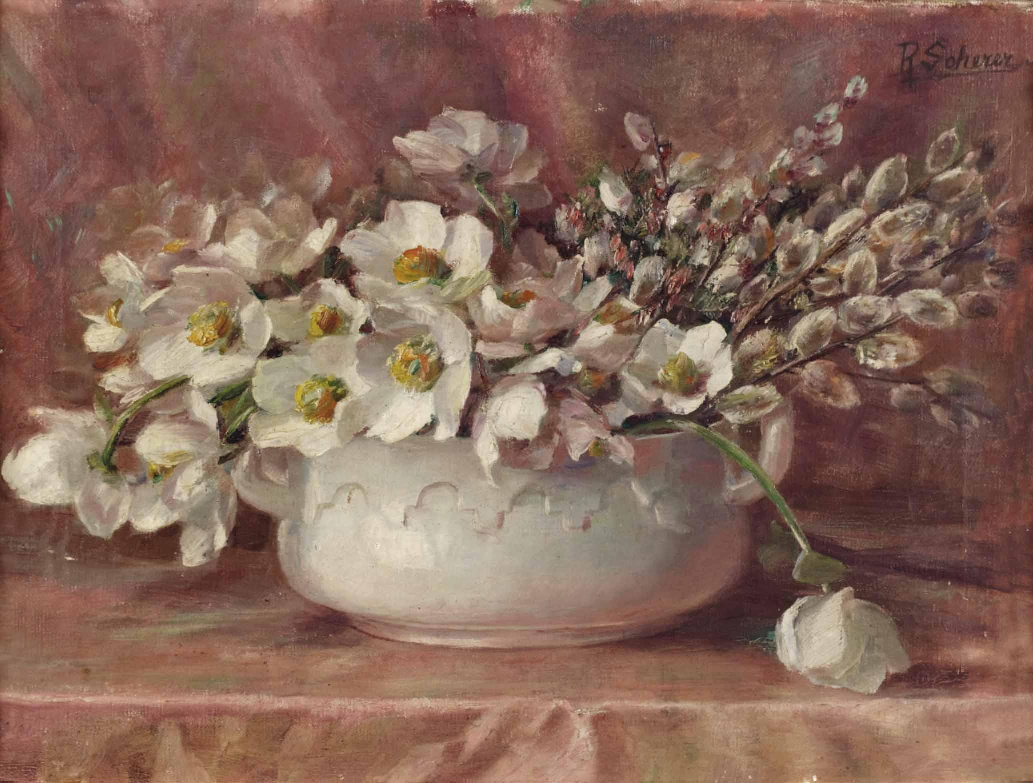 Frühlingsboten in weißer Schale